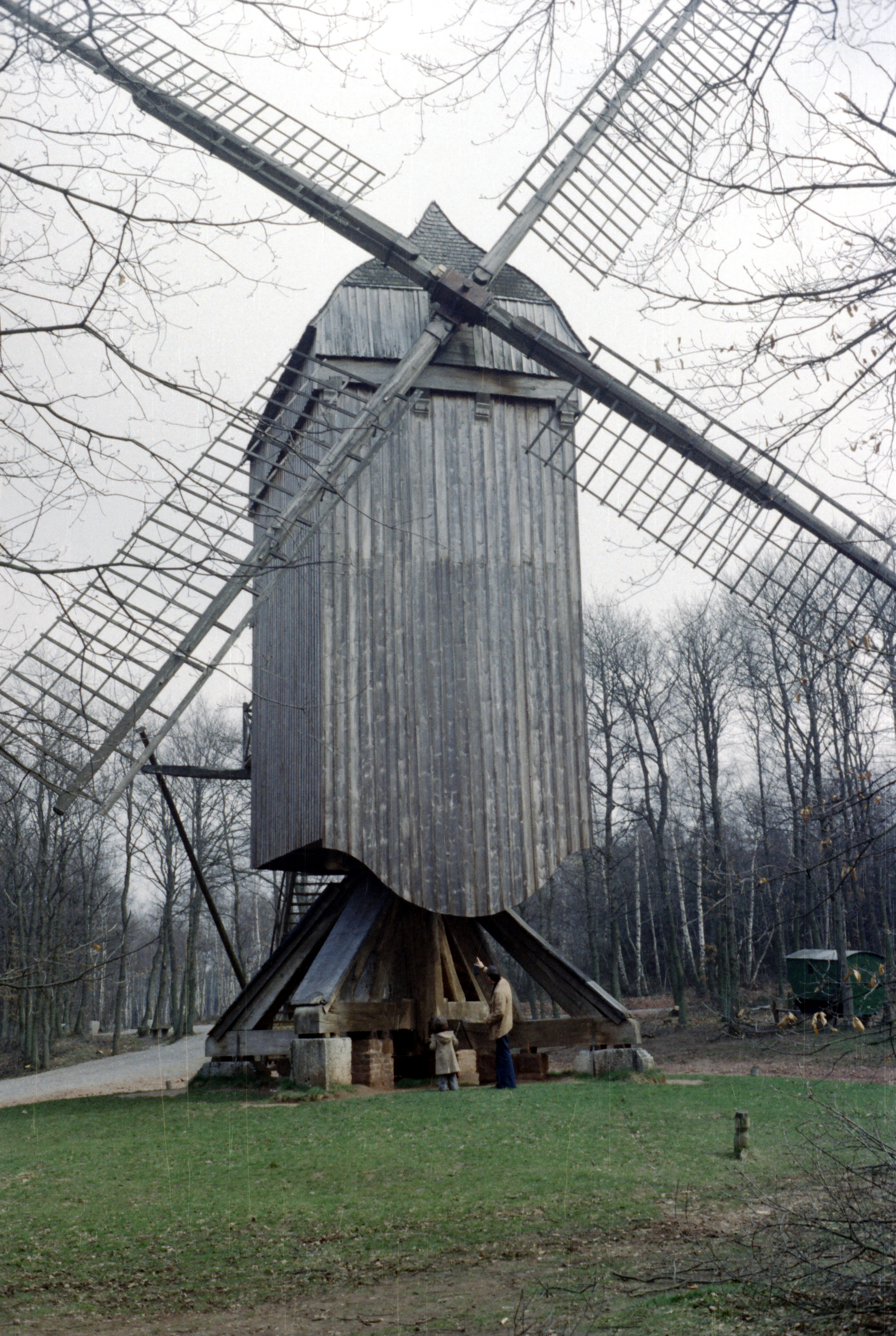 Mill, Freilichtmuseum Kommern